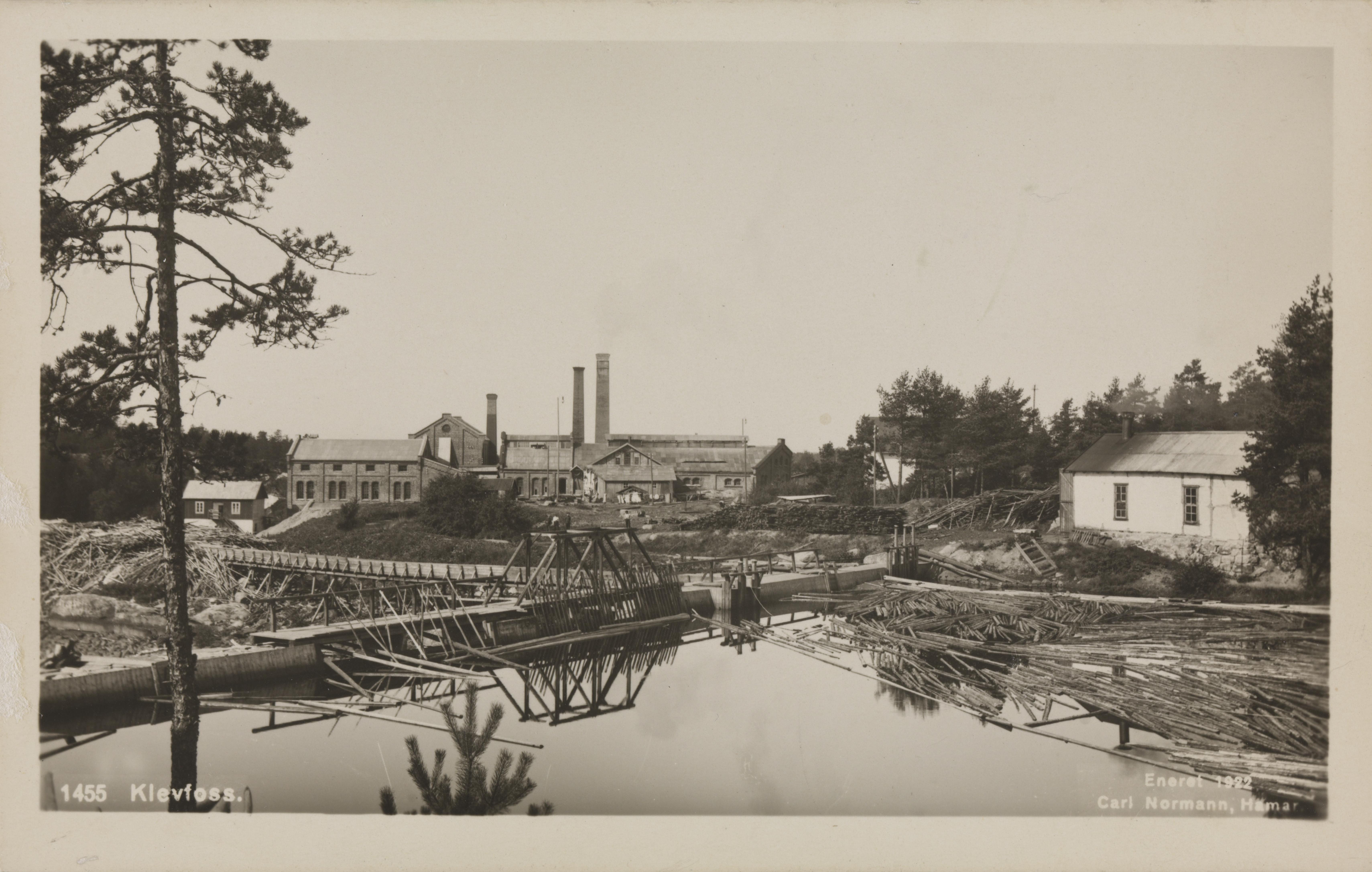 Bildet er hentet fra Nasjonalbibliotekets bildesamling Klevfoss, Løten, Hedmark